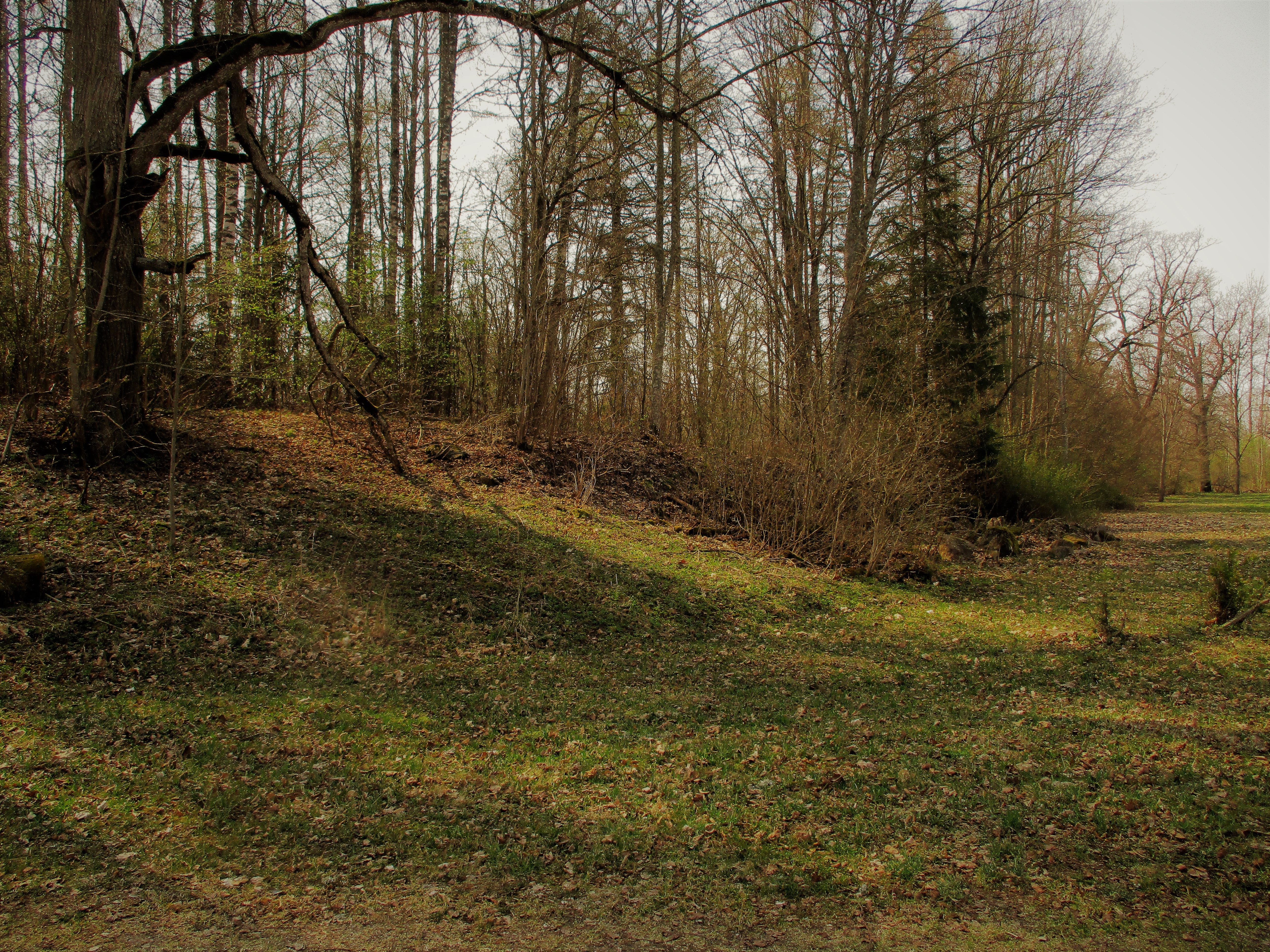 Vaade kirdest põhjapoolsele linnusevallile. Maapind laskub oja suunas 3-4 meetrit.